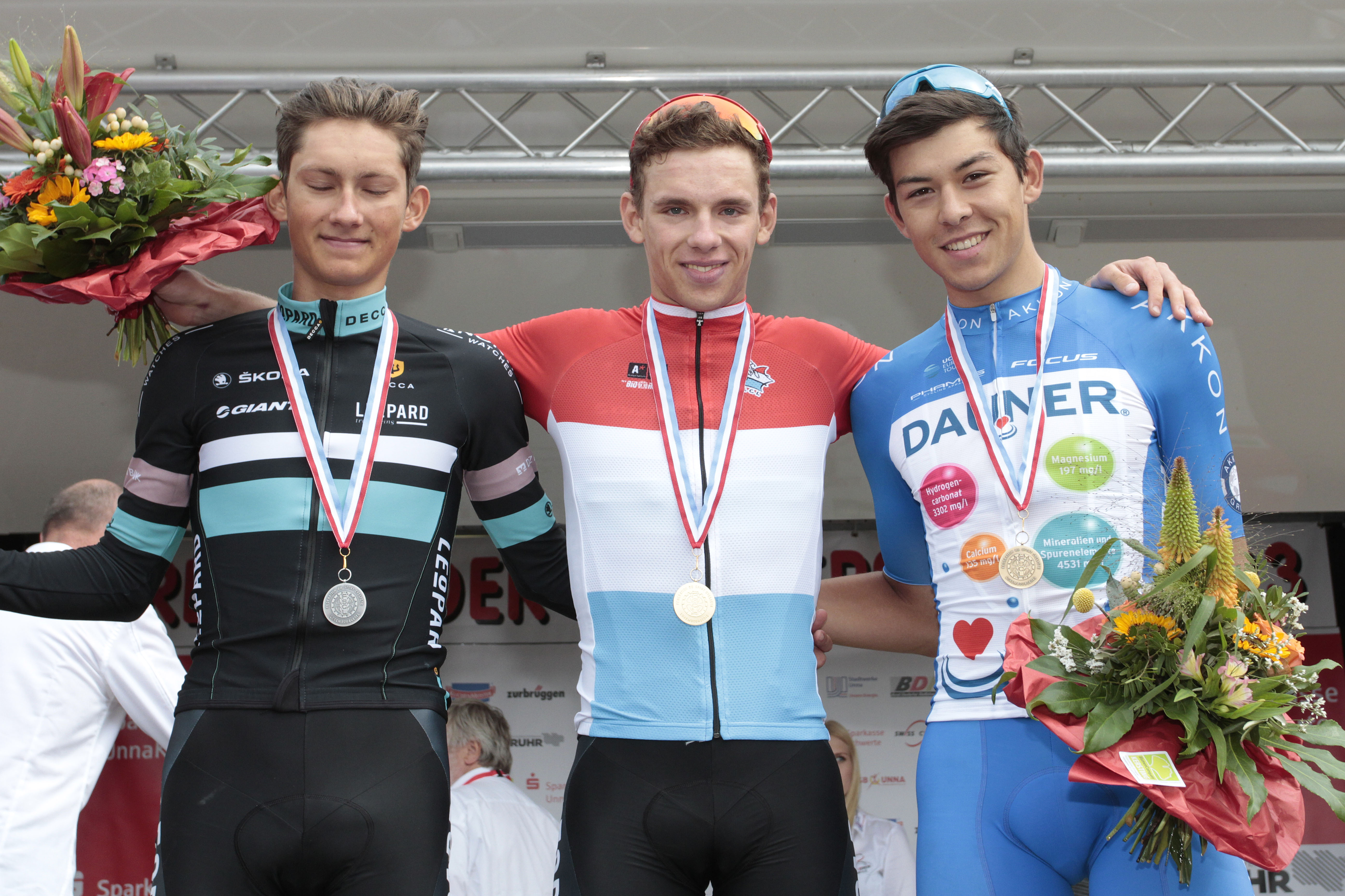 Podest Luxemburg (v.l.n.r.): Luc Wirtgen, Pit Leyder, Colin Heiderscheid